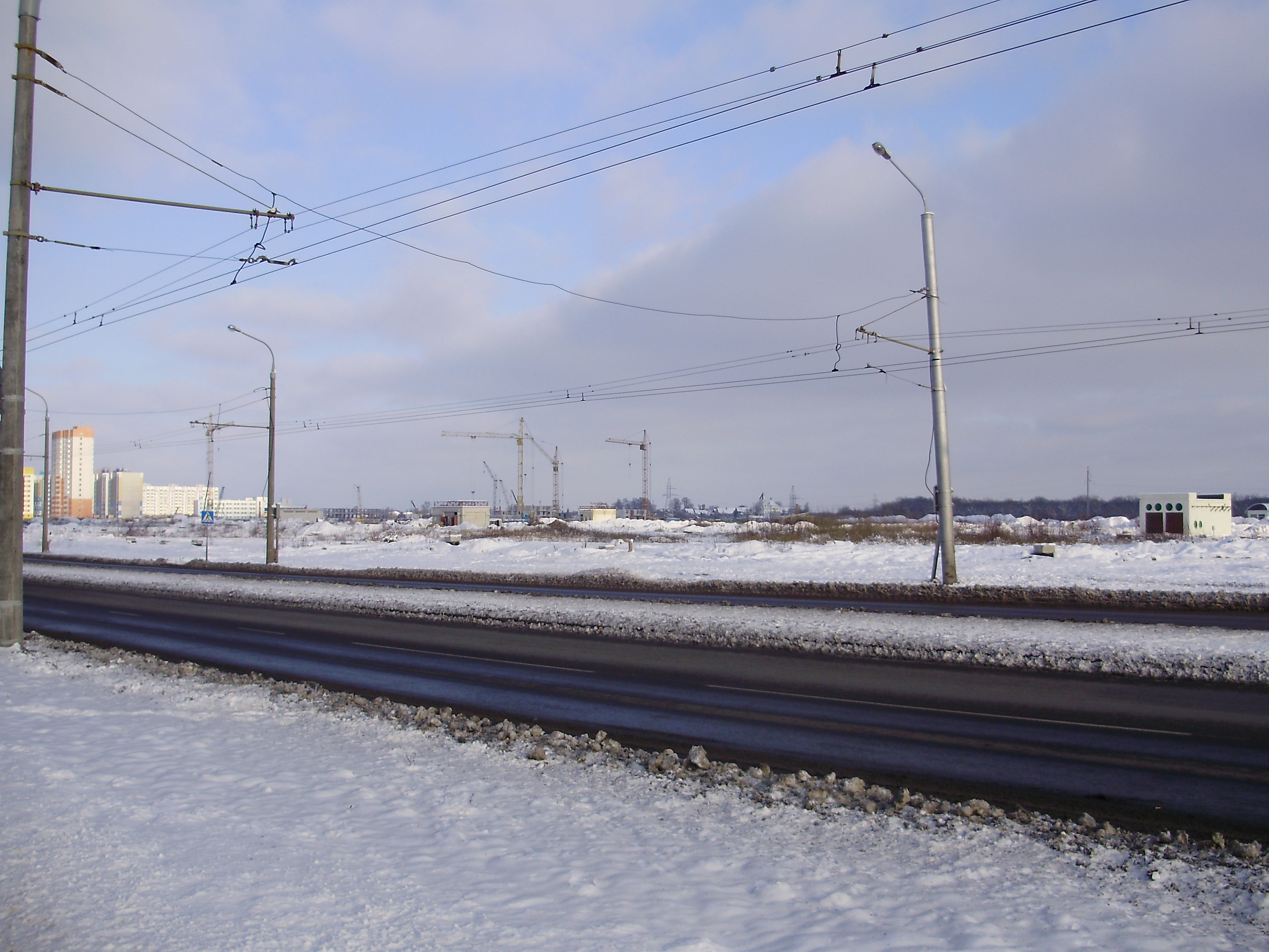 Беларуская (тарашкевіца): Будаўніцтва 18-га мк-рн у Гомелі (снежань 2009)